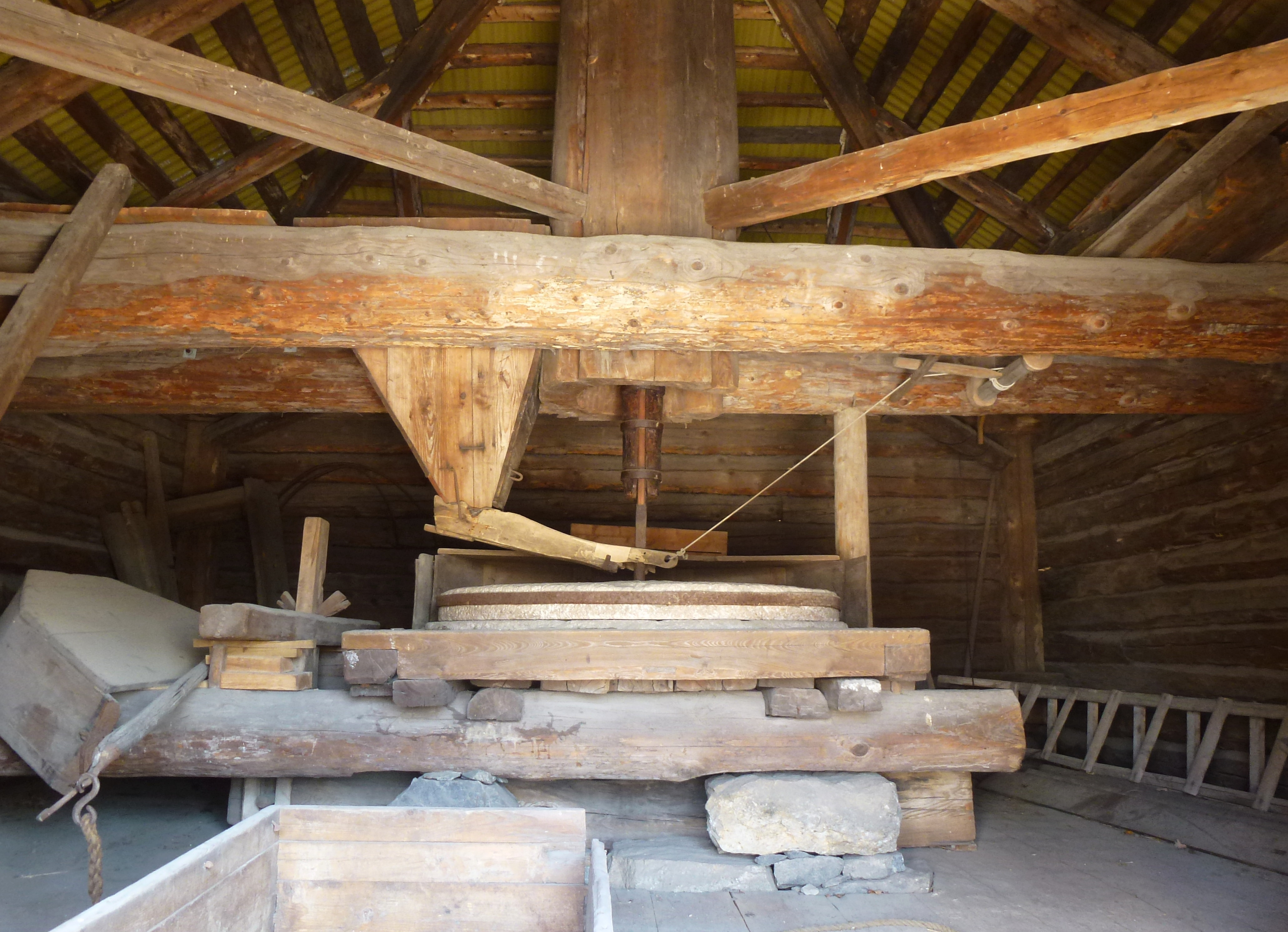 Skansen Främmestadskvarnen, malverk